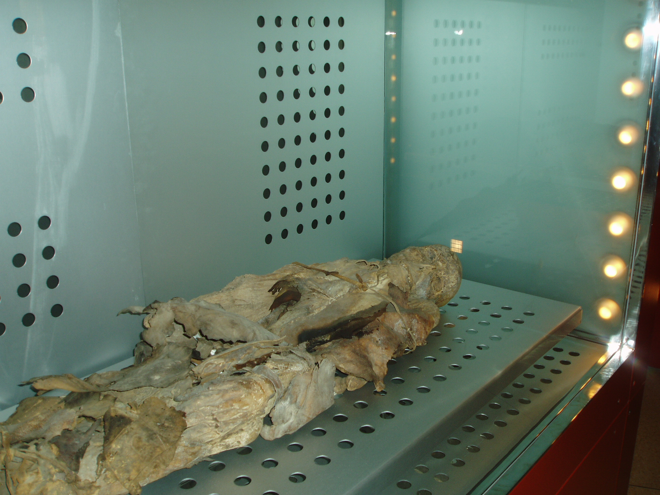 Antiguo habitante de las Islas Canarias momificado, se encuentra en el Museo de la Naturaleza y el Hombre de Santa Cruz de Tenerife. Es la conocida como "Momia de San Andrés". En este museo están permitidas las fotos sin tripode, la foto se realizó el 27-07-2006 durante una visita